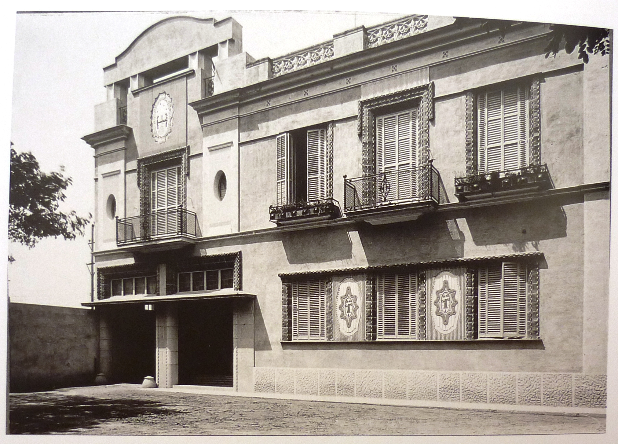 Ampliació i reforma d'una casa existent